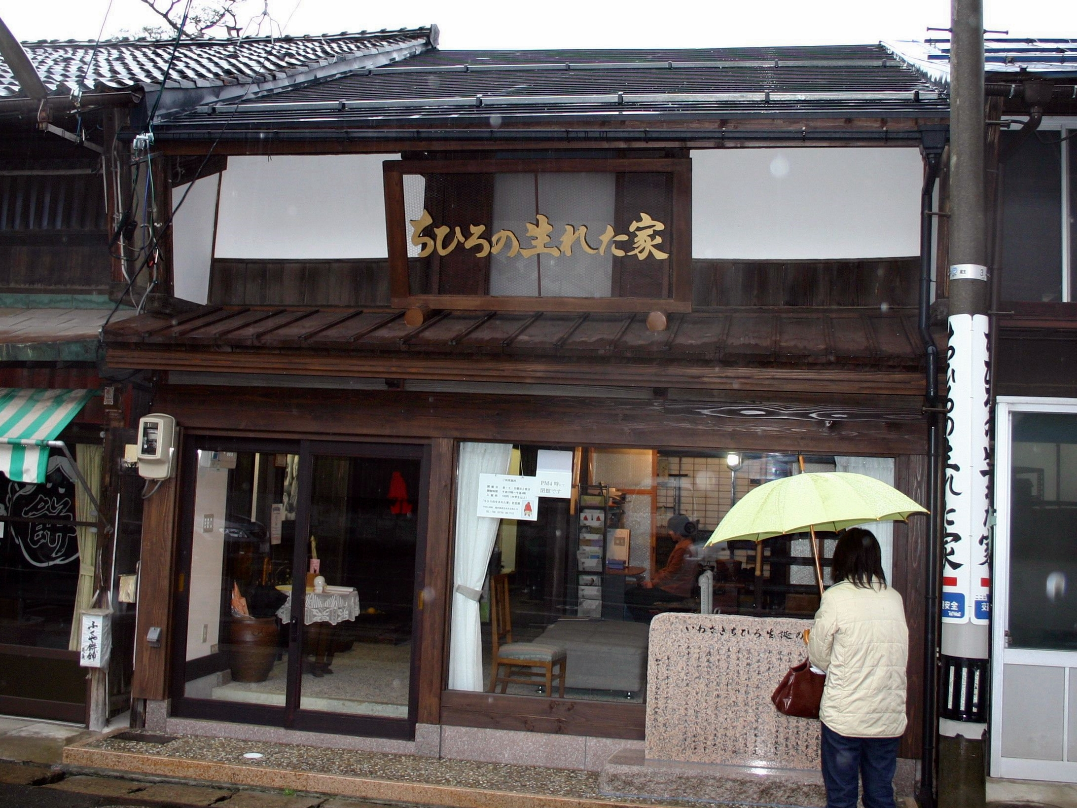 福井県越前市にあるいわさきちひろが生まれた家、母の文江が武生町立実科高等女学校に教師として赴任しているときに、ちひろを出産した。